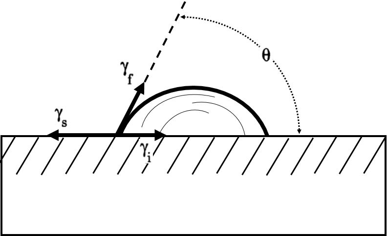 Tensões superficiais atuando em uma na superfície e na interface da partícula com o substrato